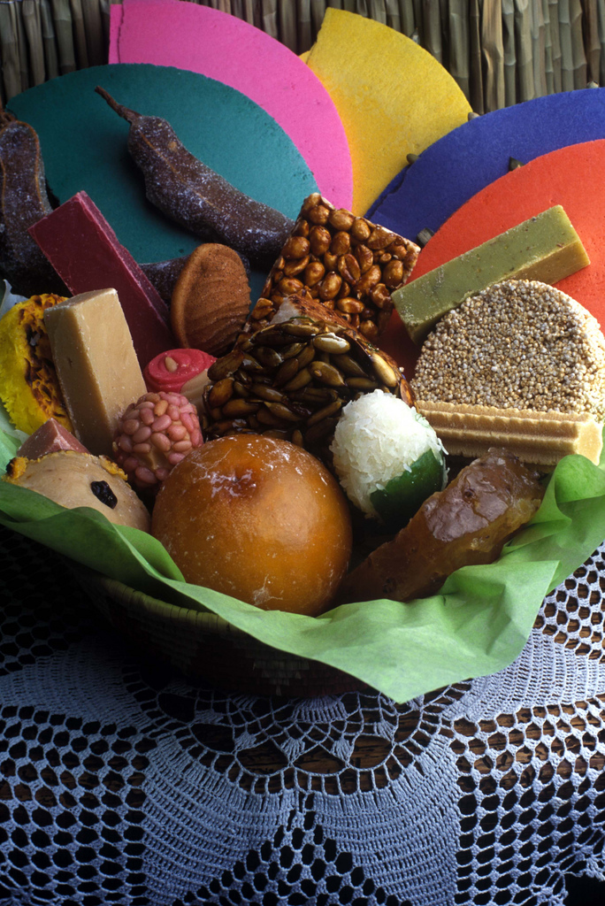 Dulces diversos de la gastronomía mexiquense. Pueden observarse obleas, tamarindos, una palanqueta rectangular de cacahuate, palanquetas circulares de pepita de calabaza y ajonjoli, ate...